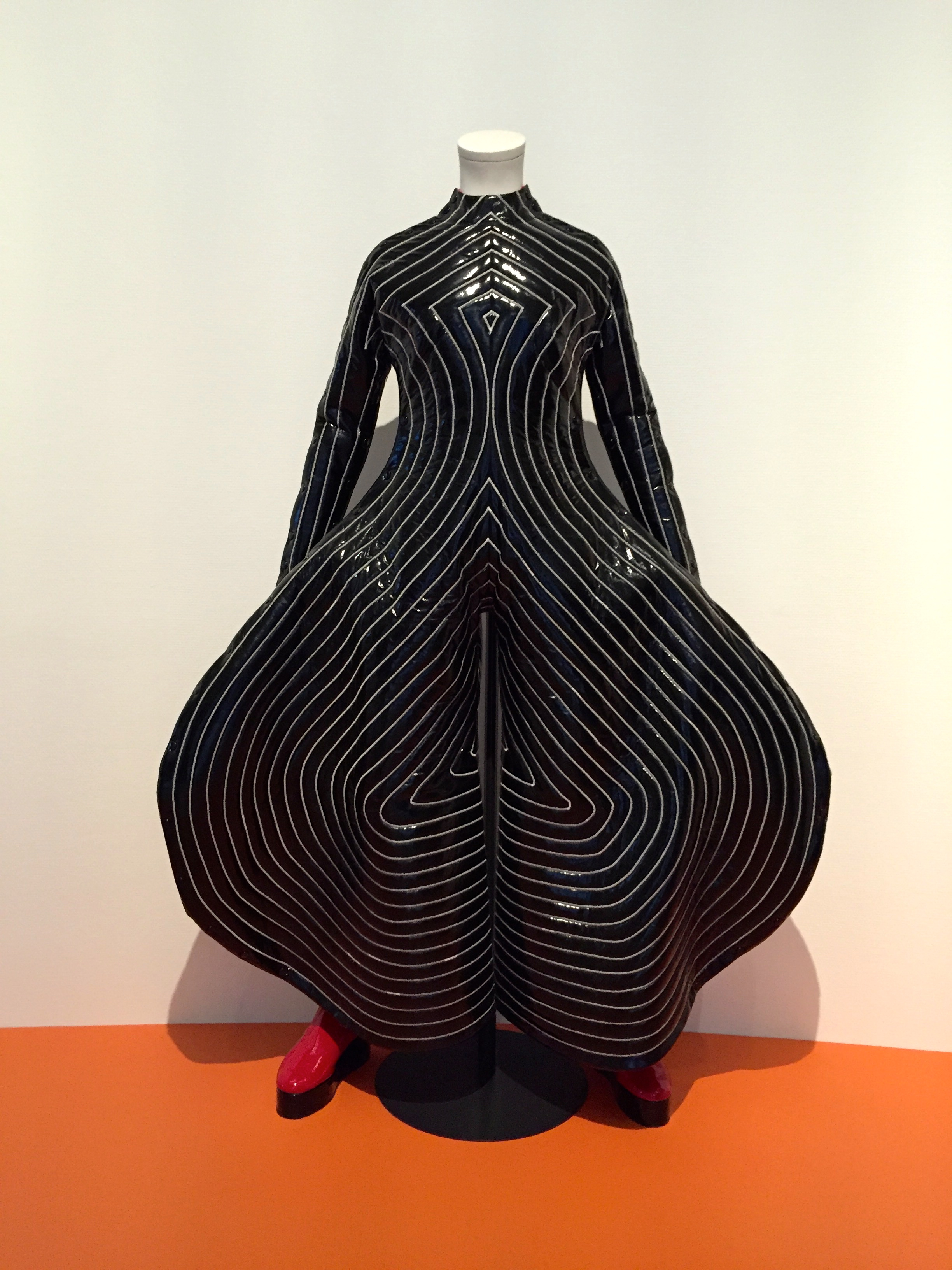 (David Bowie in) een creatie van Kansai Yamamoto uit 1973.